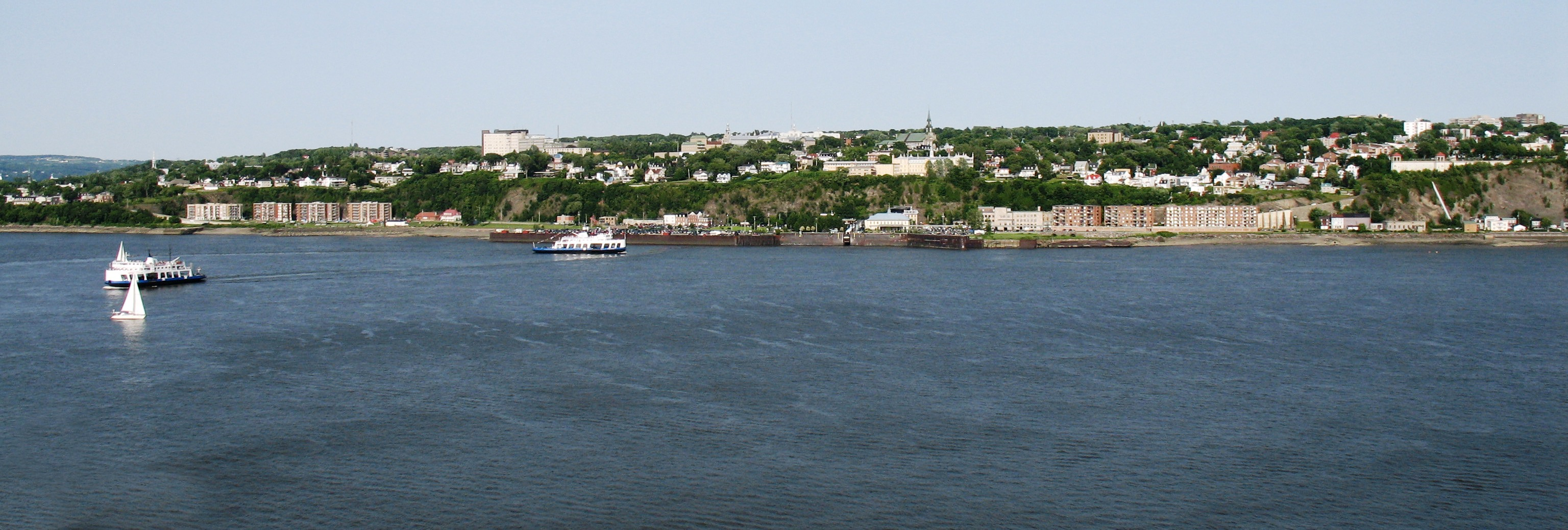 Lévis vue de la Terrasse Dufferin à Québec, Québec, Canada